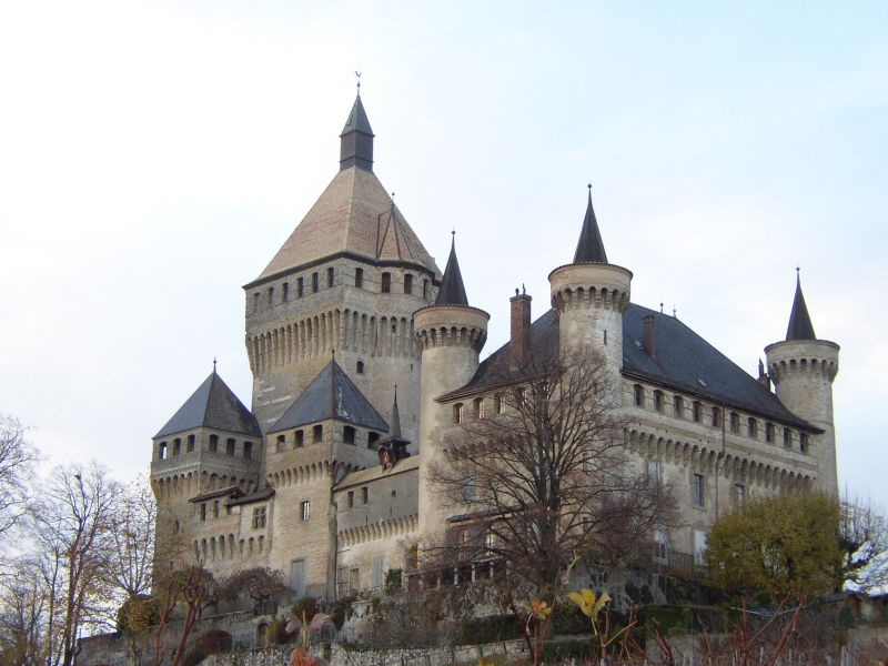 Sentier_de_la_Morges_036